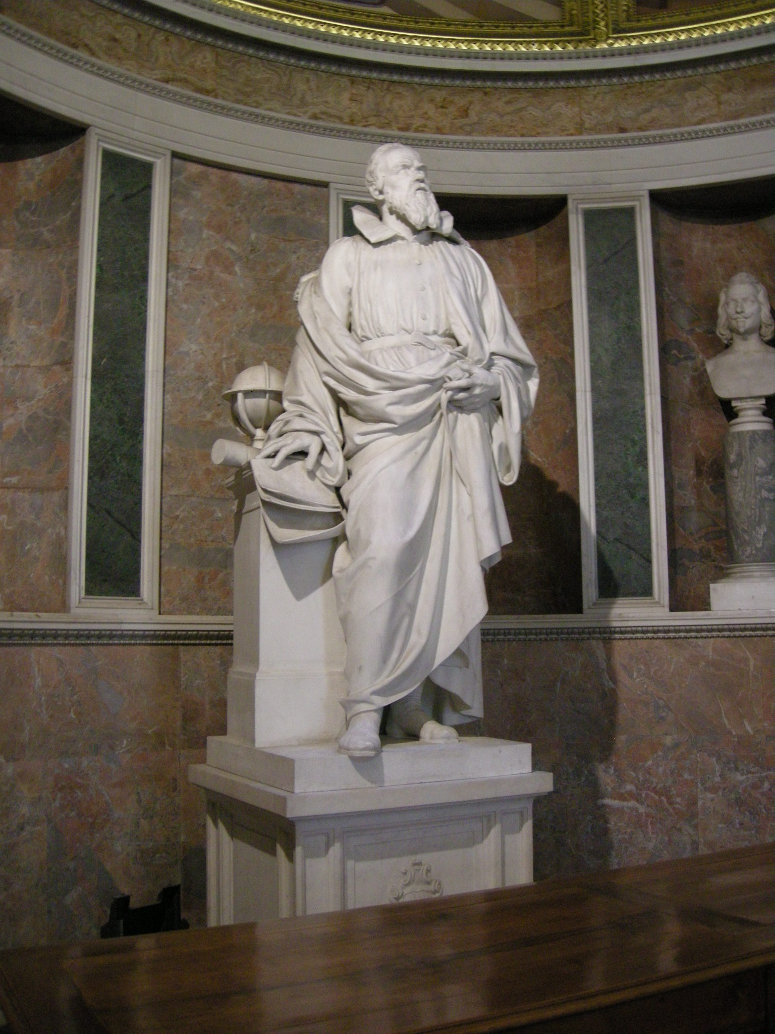 Tribuna di galileo, statua di galileo, aristodemo costoli